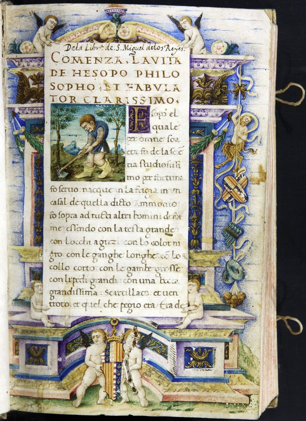 Miniatura caplletra. Orla arquitectònica amb l'escut de la casa reial napolitana